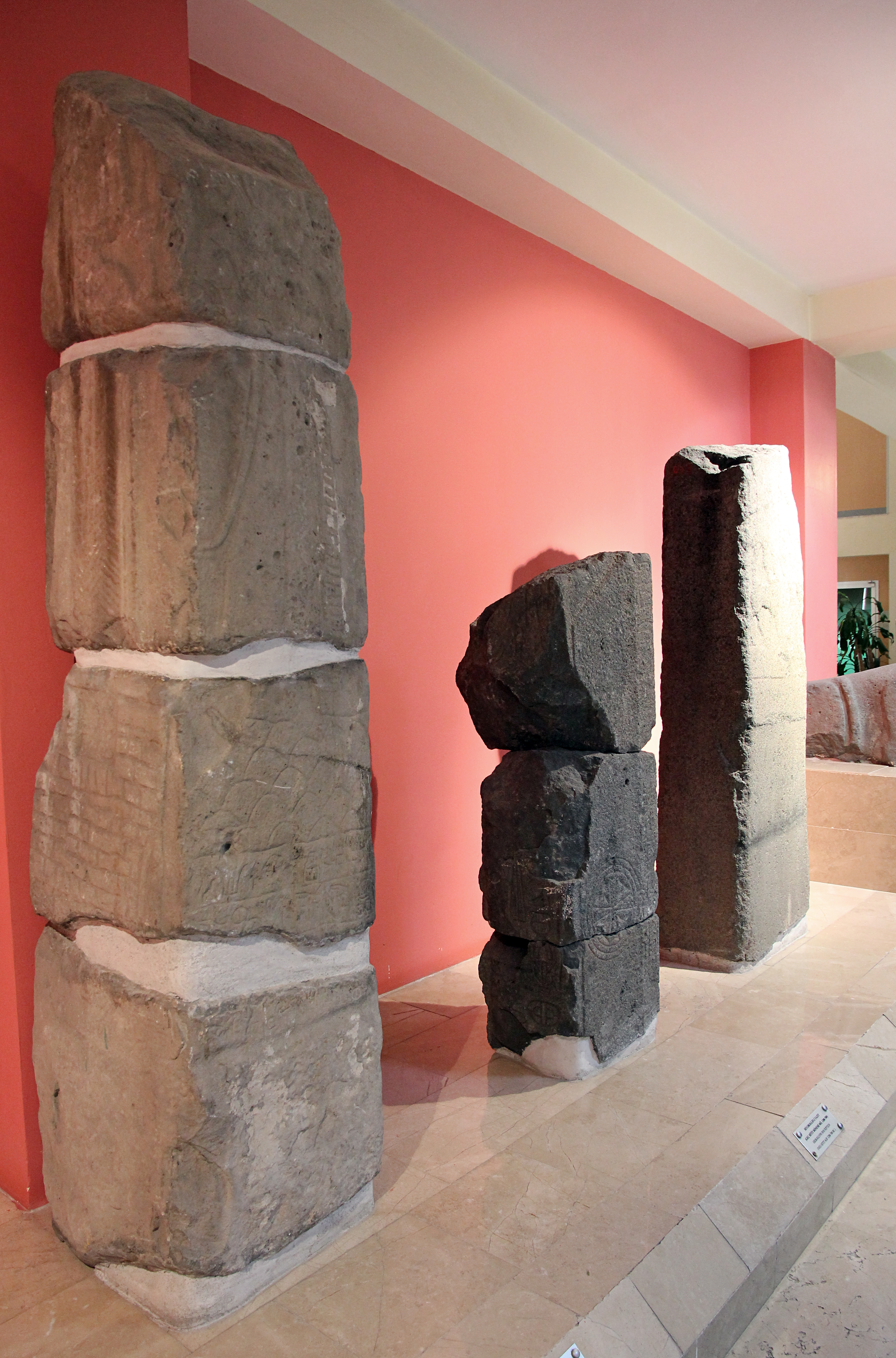 Archäologisches Museum Sivas, Zentraltürkei, Stele mit Relief und Inschrift in luwischen Hieroglyphen aus İspekçür, dahinter Stelen von Gemerek und Altinyayla